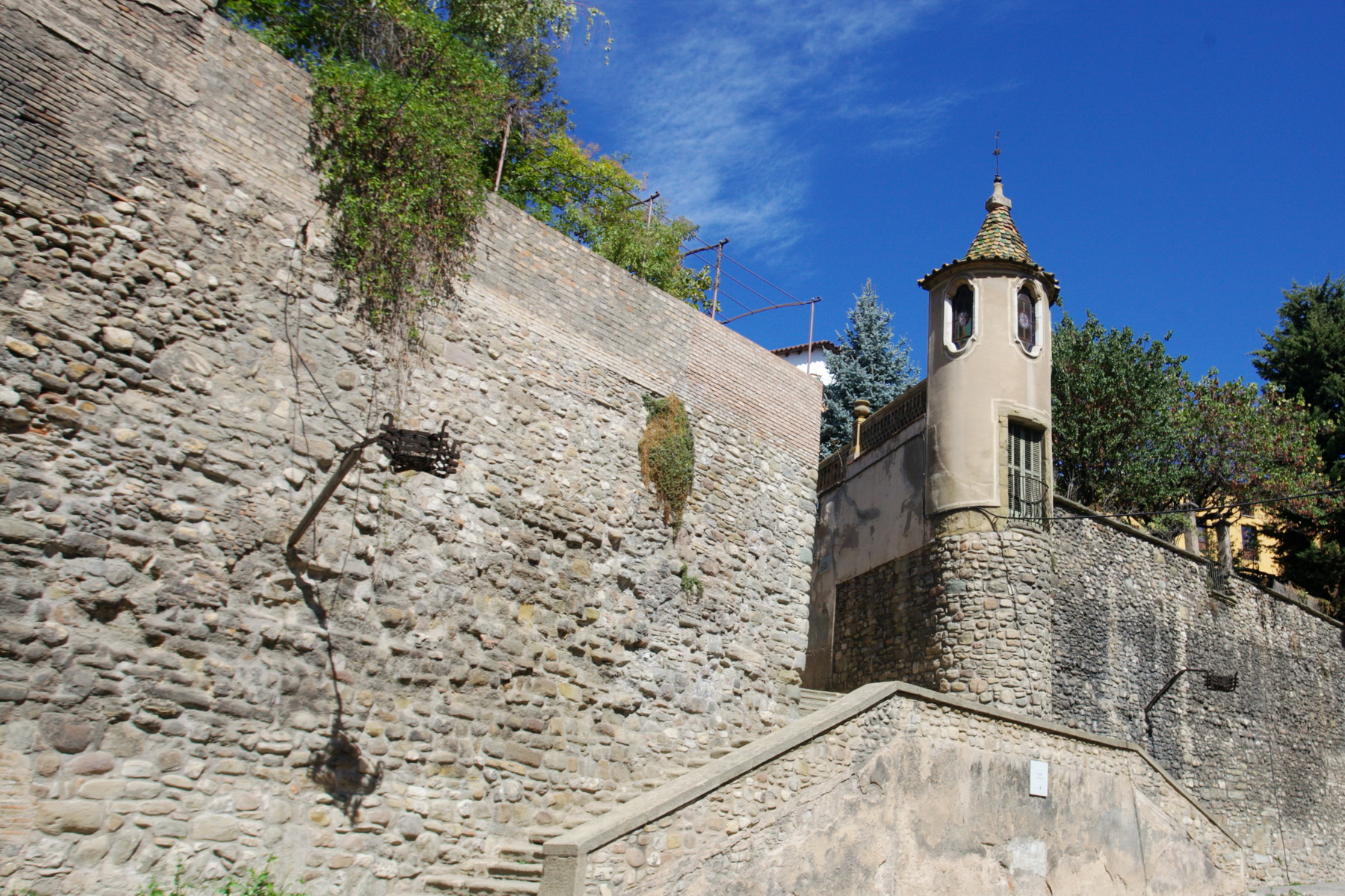 Muralles de Vic